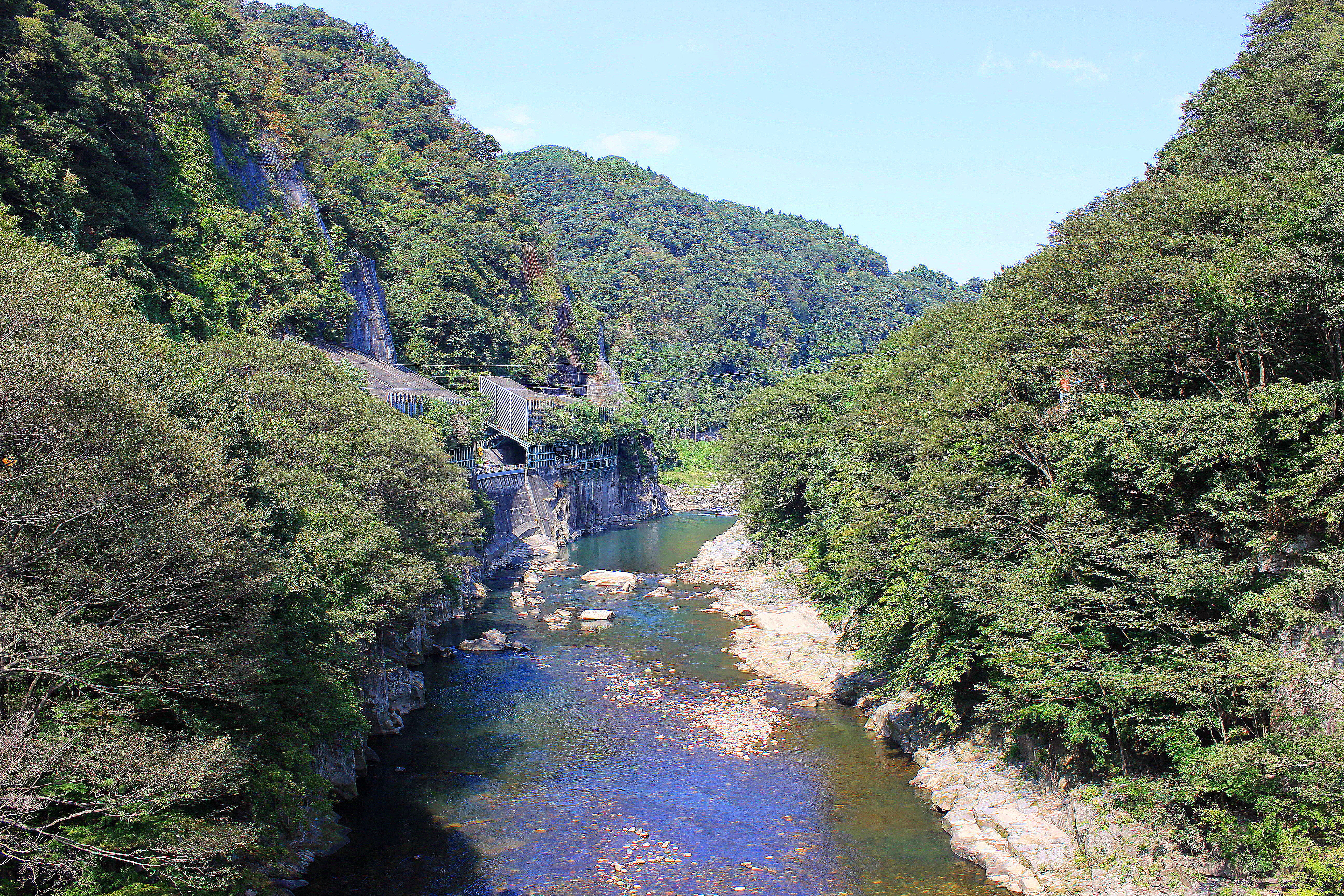 旧・沼田ダム建設予定地付近